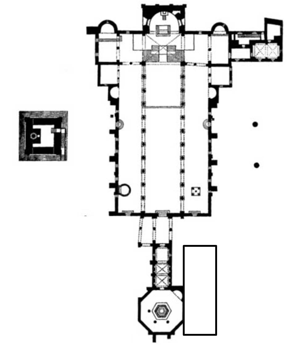 Basilica di Aquileia early 21st century (Südhalle included)